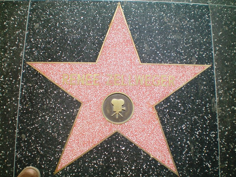 Renee Zelwigger, Walk Of Fame